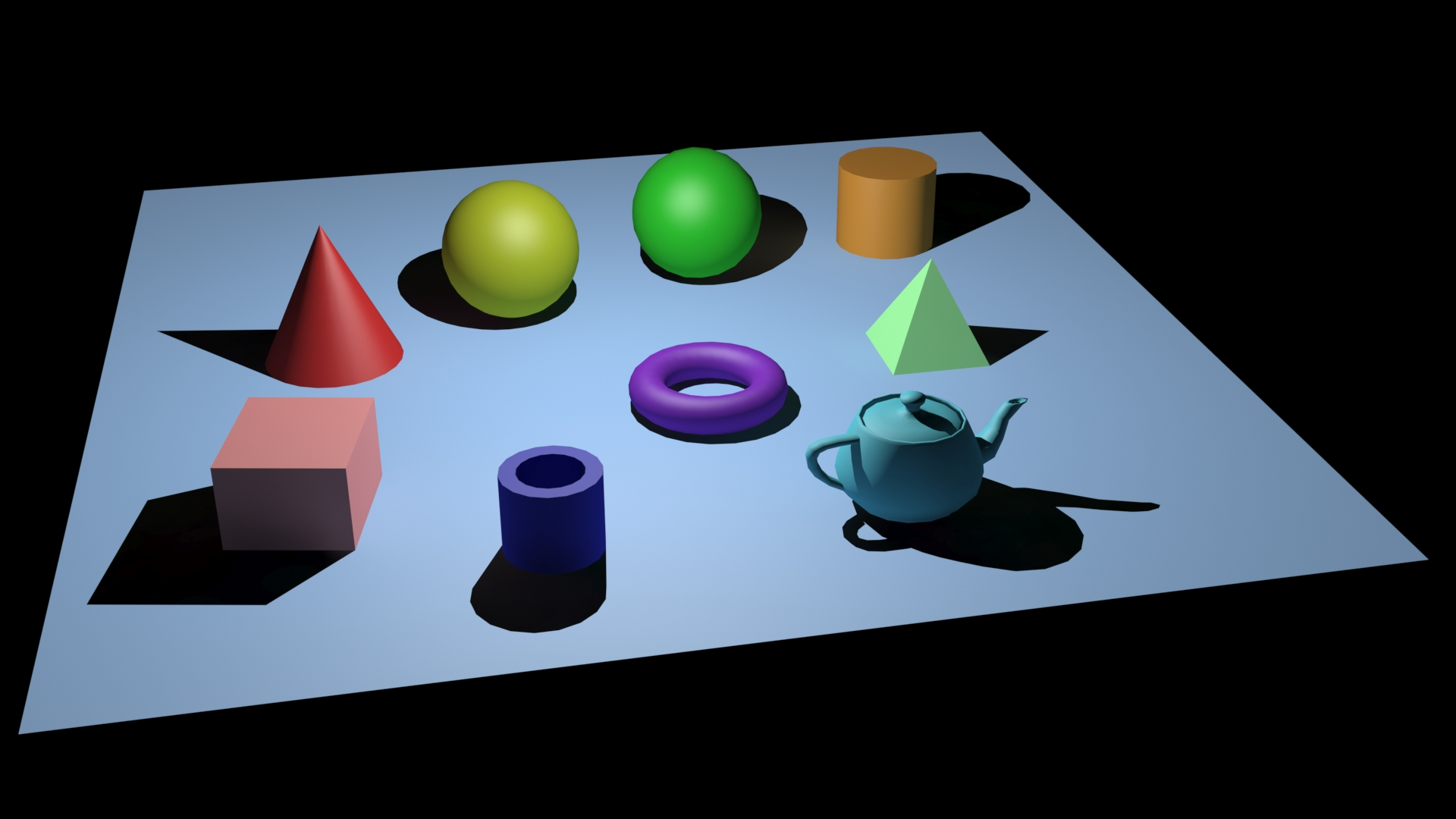 Primitivna telesa: Kvader (roza), Stožec (rdeča), Krogla (rumena), Geosfera (zelena), Valj (oranžna), Cev (temno modra), Torus (vijolična), Piramida (svetlo zelena) in Čajnik (svetlo modra).